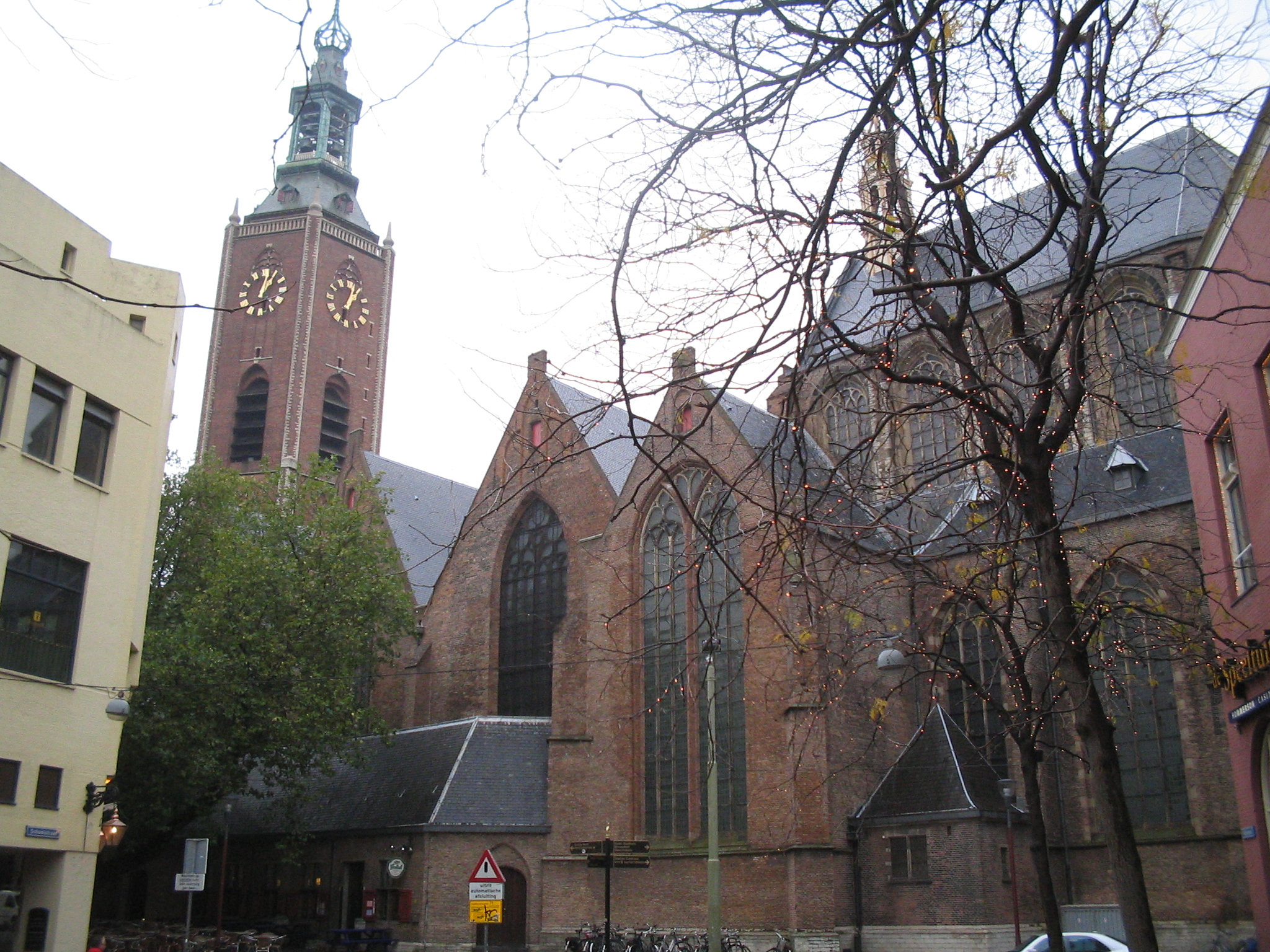 Grote kerk Den Haag, Netherlands, 21 oktober 2005